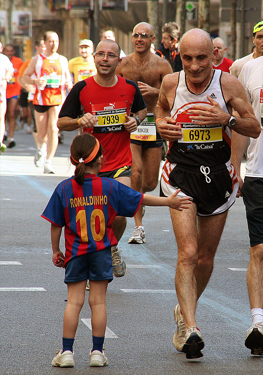 Una joven mano es capaz de arrancar una leve sonrisa de alguien exhausto y que ha vivido mucho, no es maravilloso? El deporte es una de las pocas cosas que une a las personas, es posible que esa niña dentro de 20 años este corriendo ese mismo marathon.